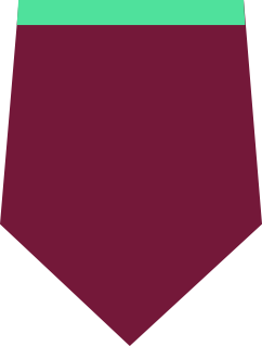 Patka artylerii i służby uzbrojenia używana w latach 1952-1960